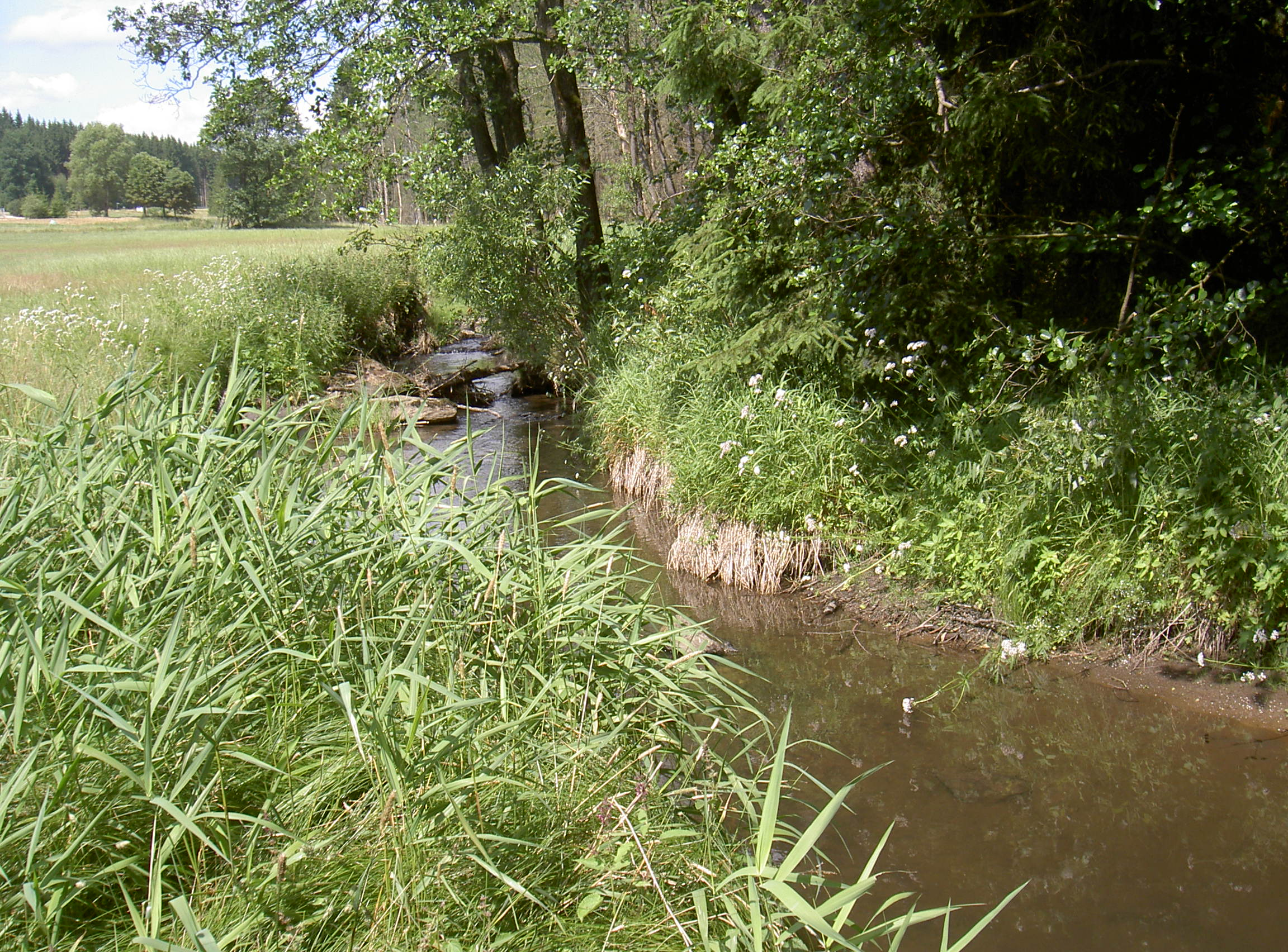 Bayerische Schwarzach bei Charlottenthal